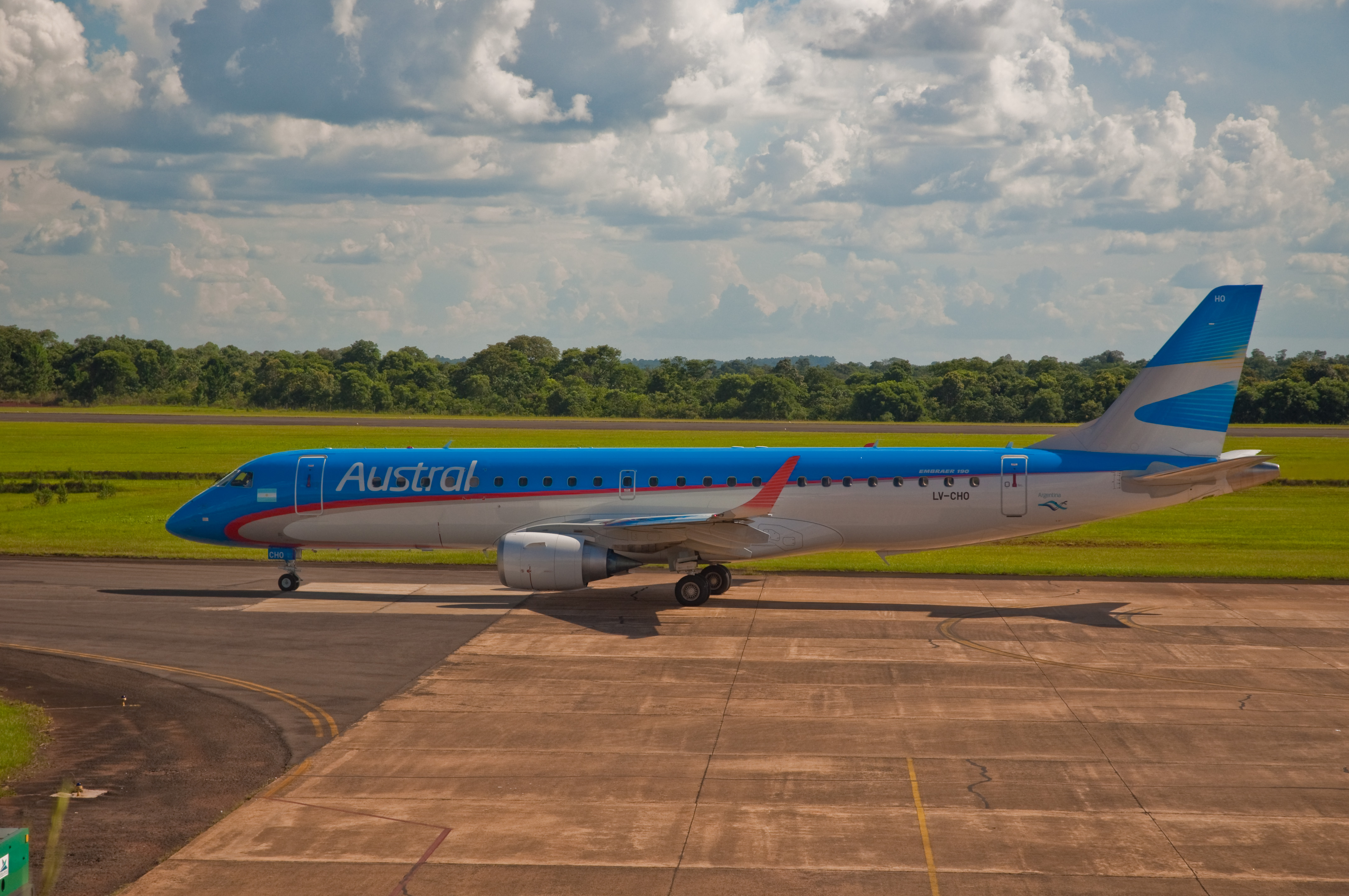 Austral Embraer 190, Puerto Iguazu, Misiones, Argentina, Jan. 2011